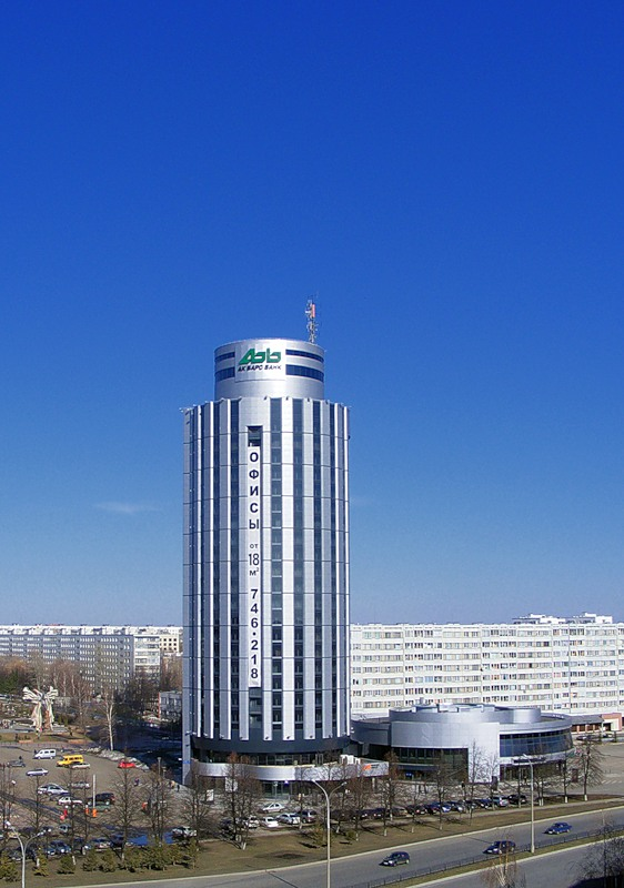 Здание 25-ти этажного бизнес-центра "2.18" в Набережных Челнах, более известного как "Тюбитейка"